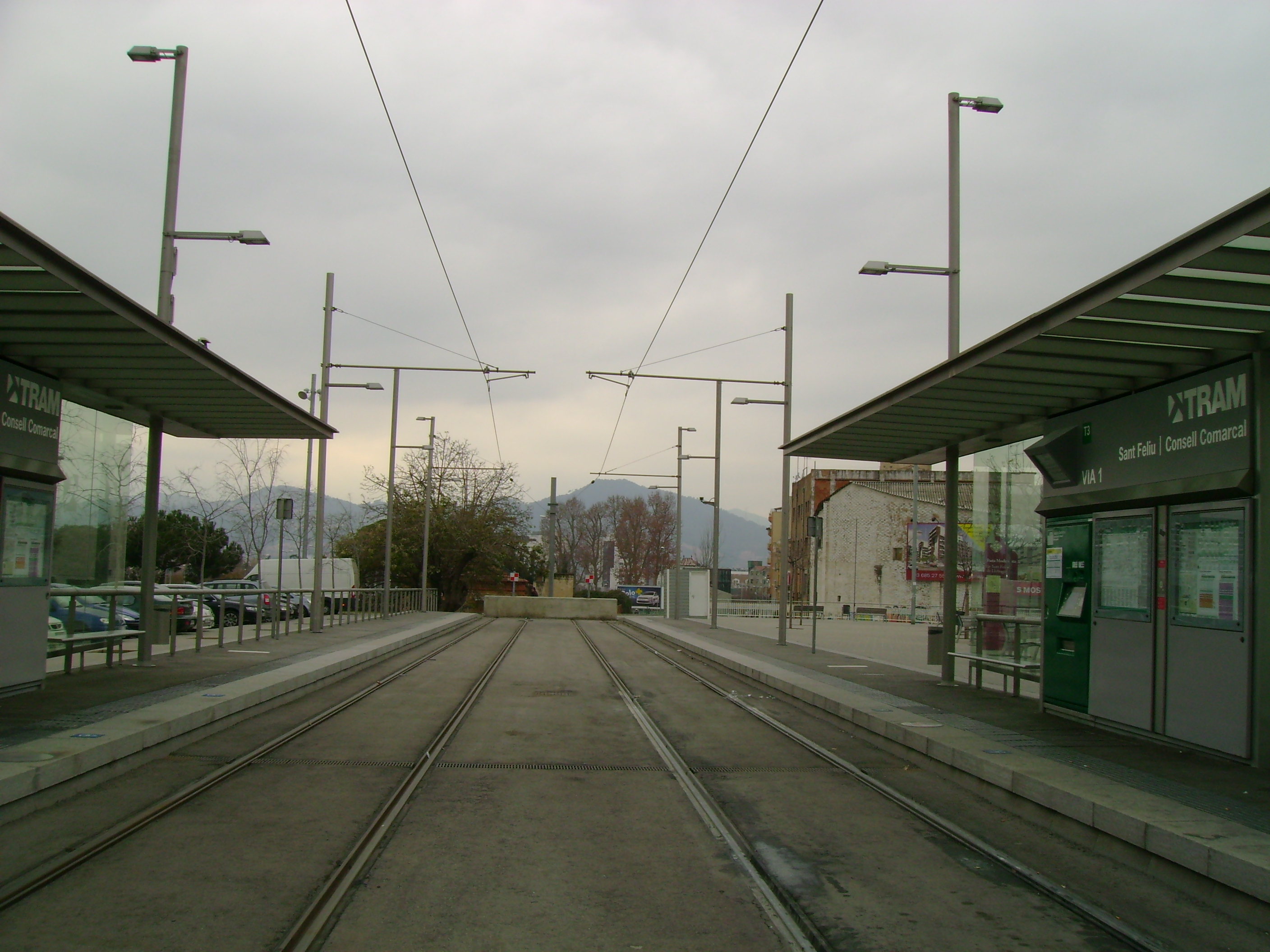 Foto capturada per la meva càmara a l'estació de Sant Feliu - Consell Comarcal (Trambaix).